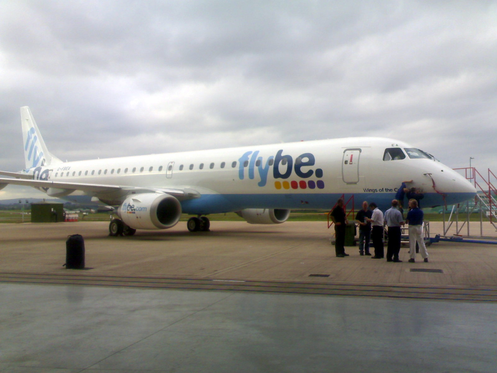 Flybe Embraer 195